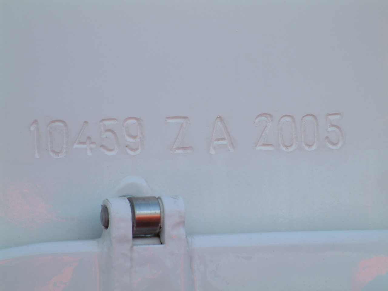 Brandmerk Koos van Mossel KNRM